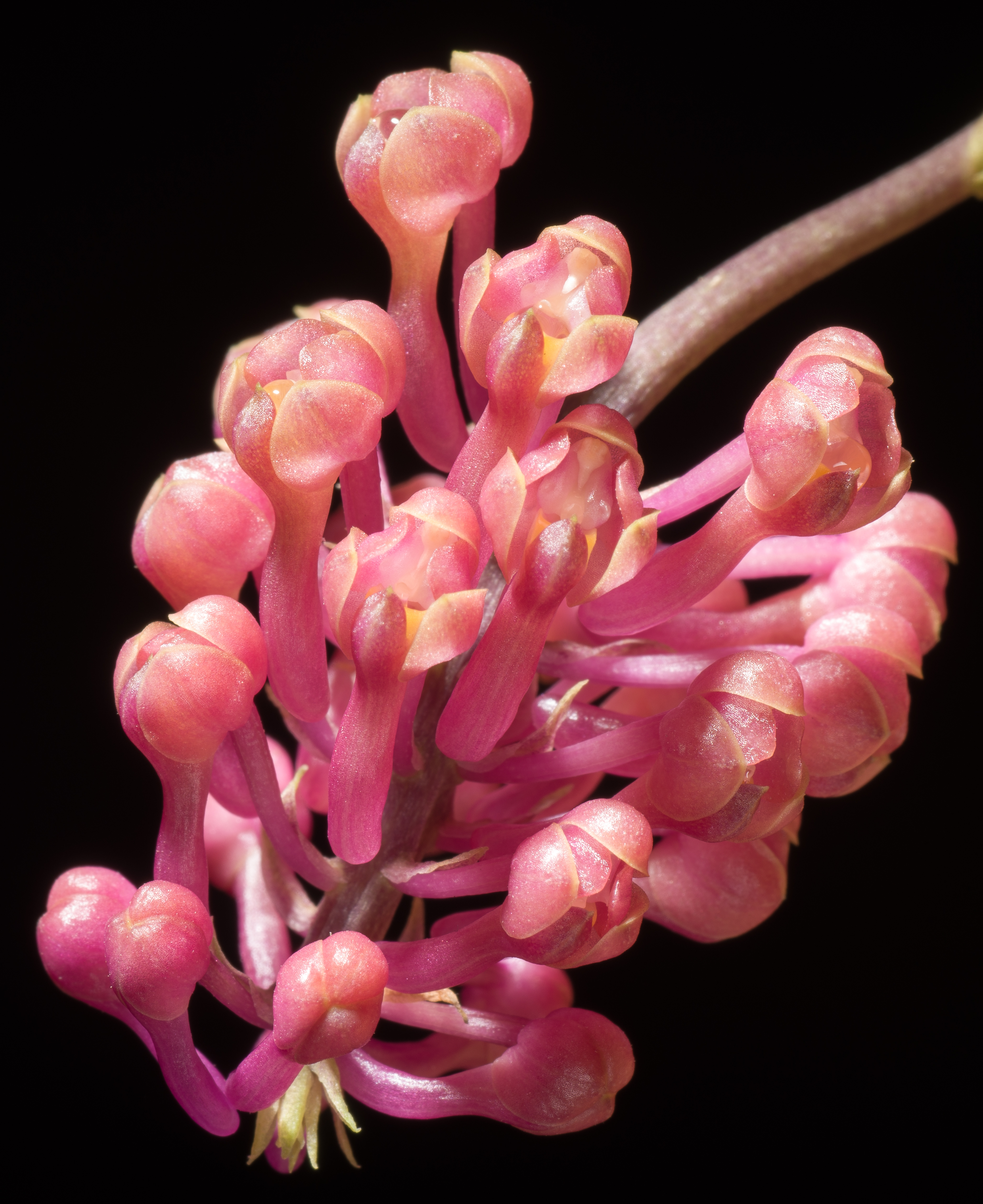 Robiquetia cerina